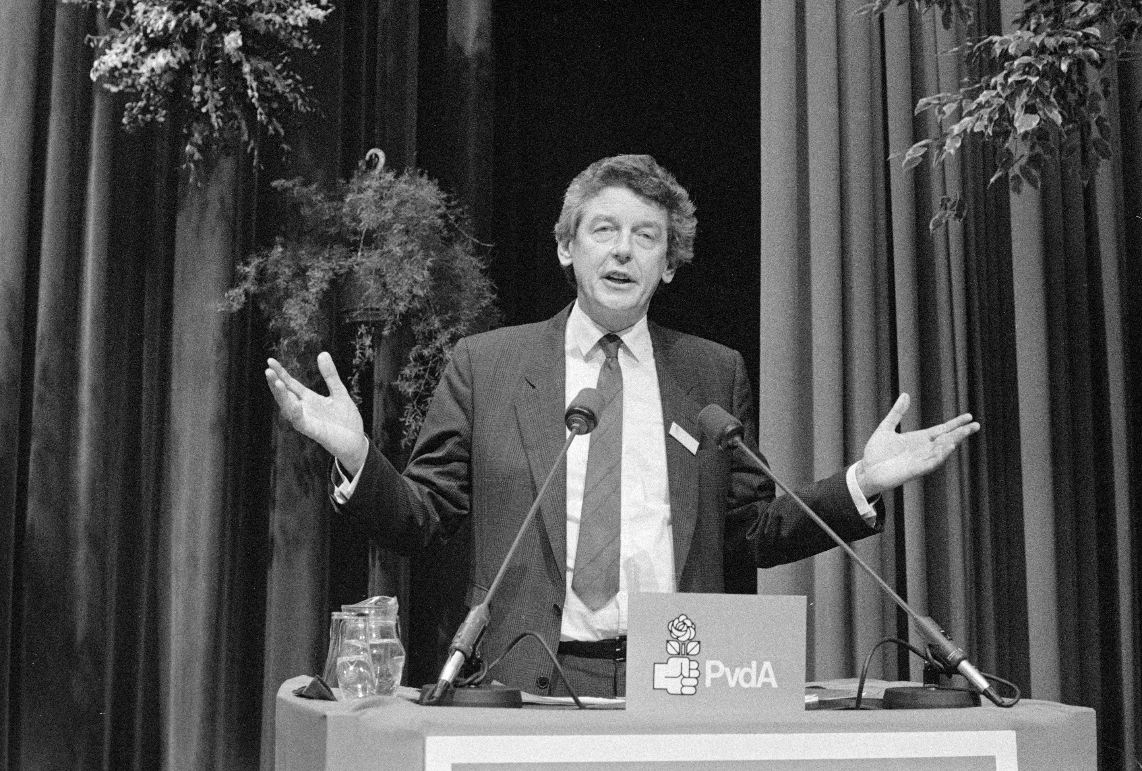 Nationaal Archief Beschrijving: Laatste dag 21e PvdA partijcongres in Amsterdam; Wim Kok tijdens slottoespraak Datum: 4 april 1987 Bestanddeelnummer NL-HaNA_Anefo_933-9424 Vervaardiger: Gerrits, Roland / Anefo URL: Voor meer informatie over het Nationaal Archief: Voor meer foto's uit deze en andere collecties, bezoek onze Beeldbank:, U kunt ons helpen onze kennis van de fotocollecties te verrijken door tags en commentaren toe te voegen. Herkent u mensen of locaties of heeft u een bijzonder verhaal te vertellen bij één van de foto's, laat dan een reactie achter (als u ingelogd bent bij Flickr) of stuur een mailtje naar